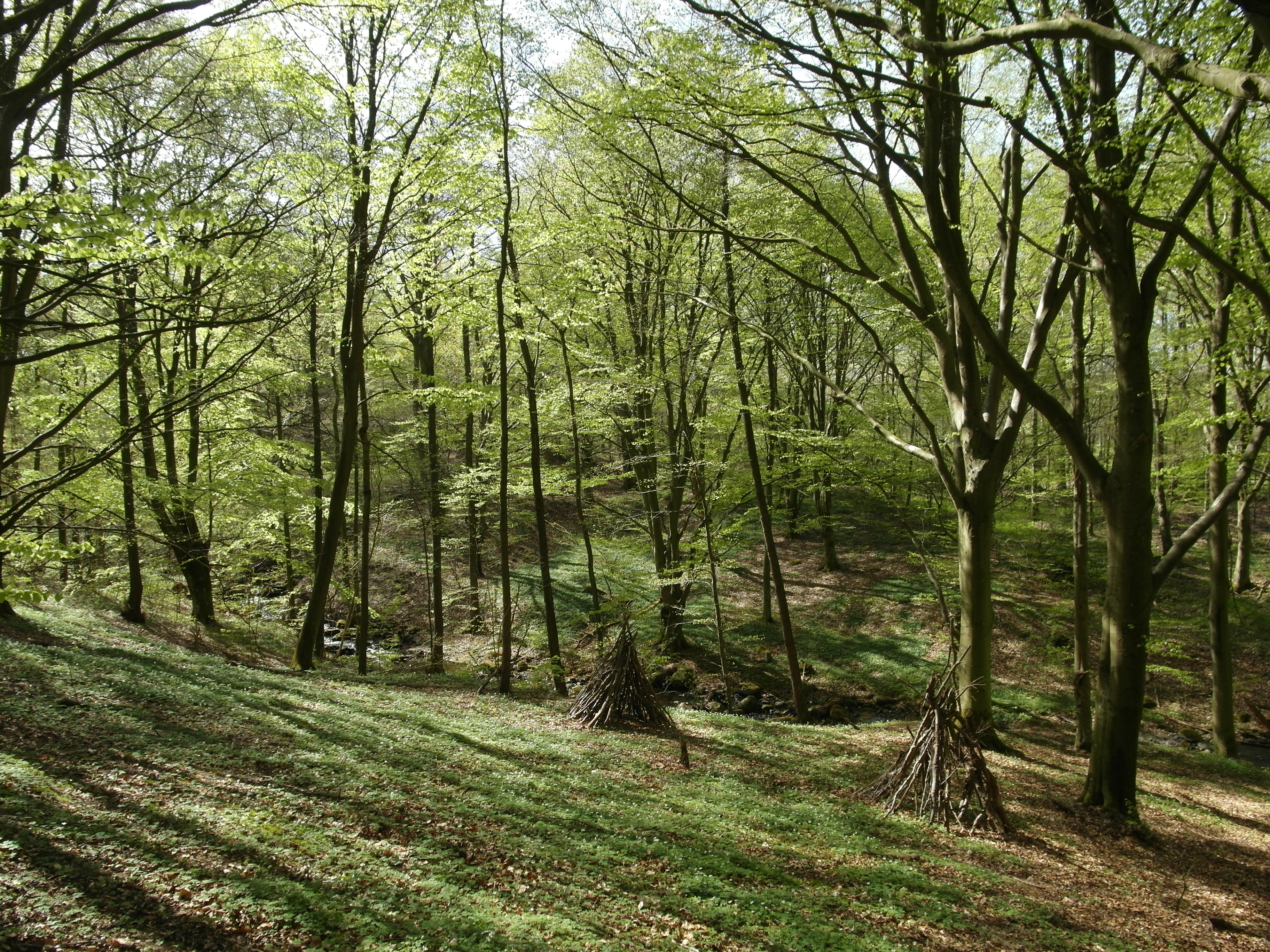 Bäckravin i Humlamadens naturreservat